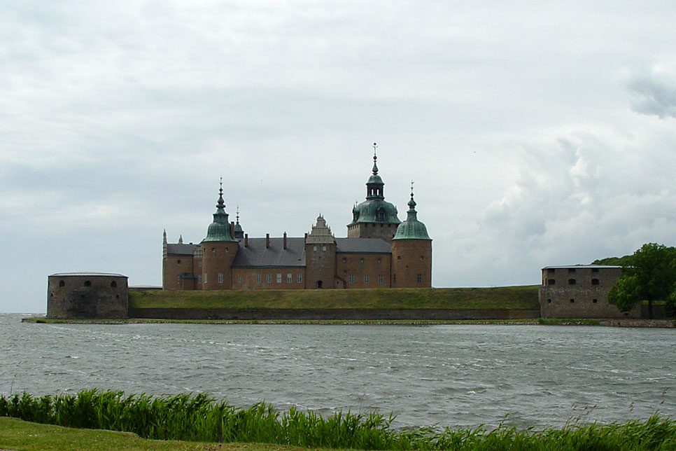 Kalmar Schloss